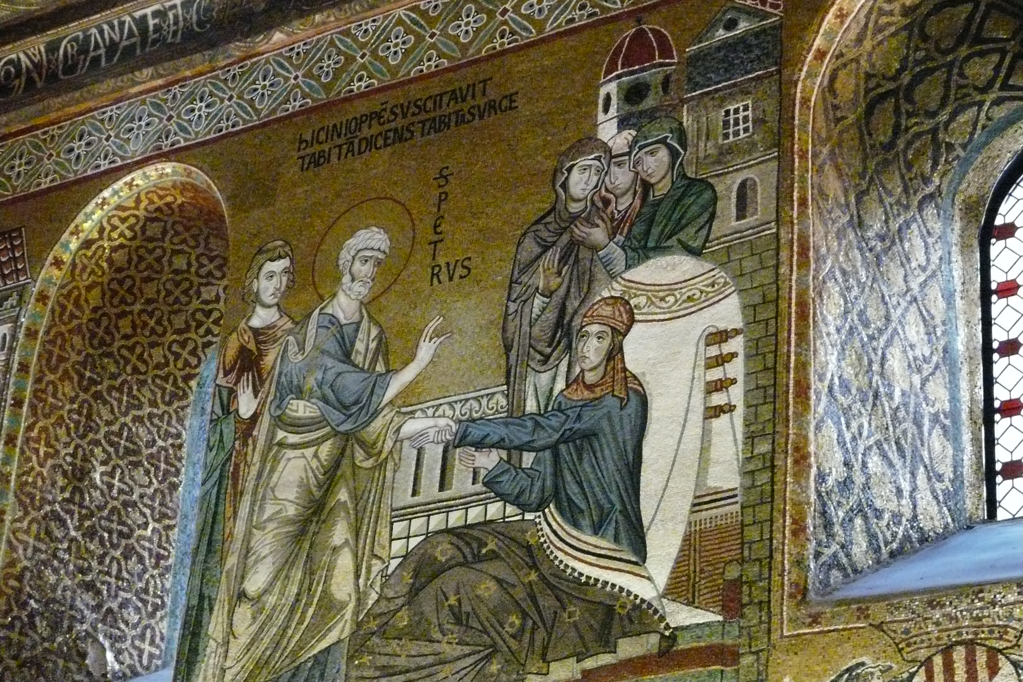 CAPILLA PALATINA DE PALERMO. MOSAICOS BIZANTINOS